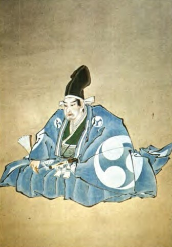 神保長誠の肖像。